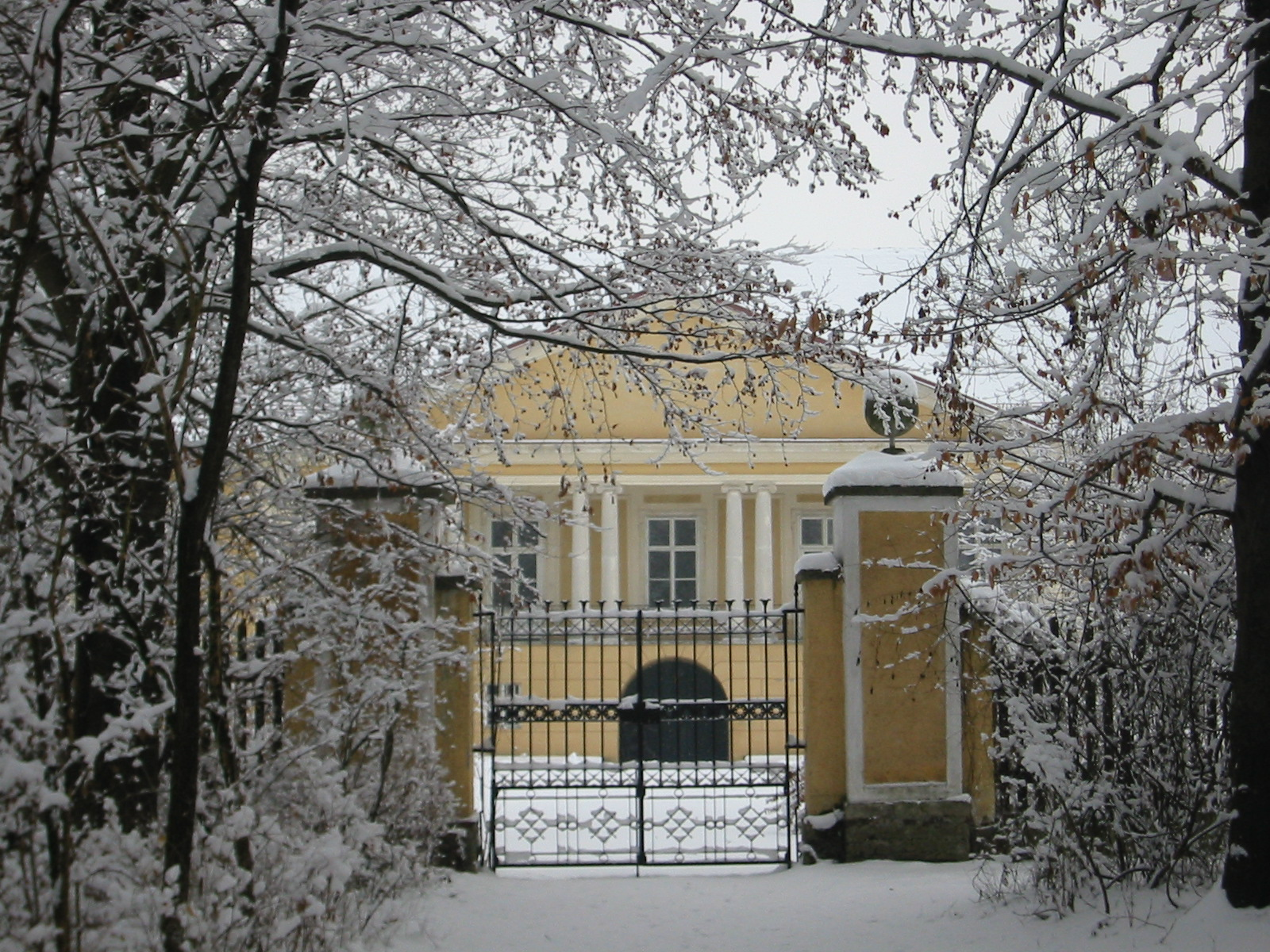 Schloss Retzhof aufgenohmen im Januar 2002